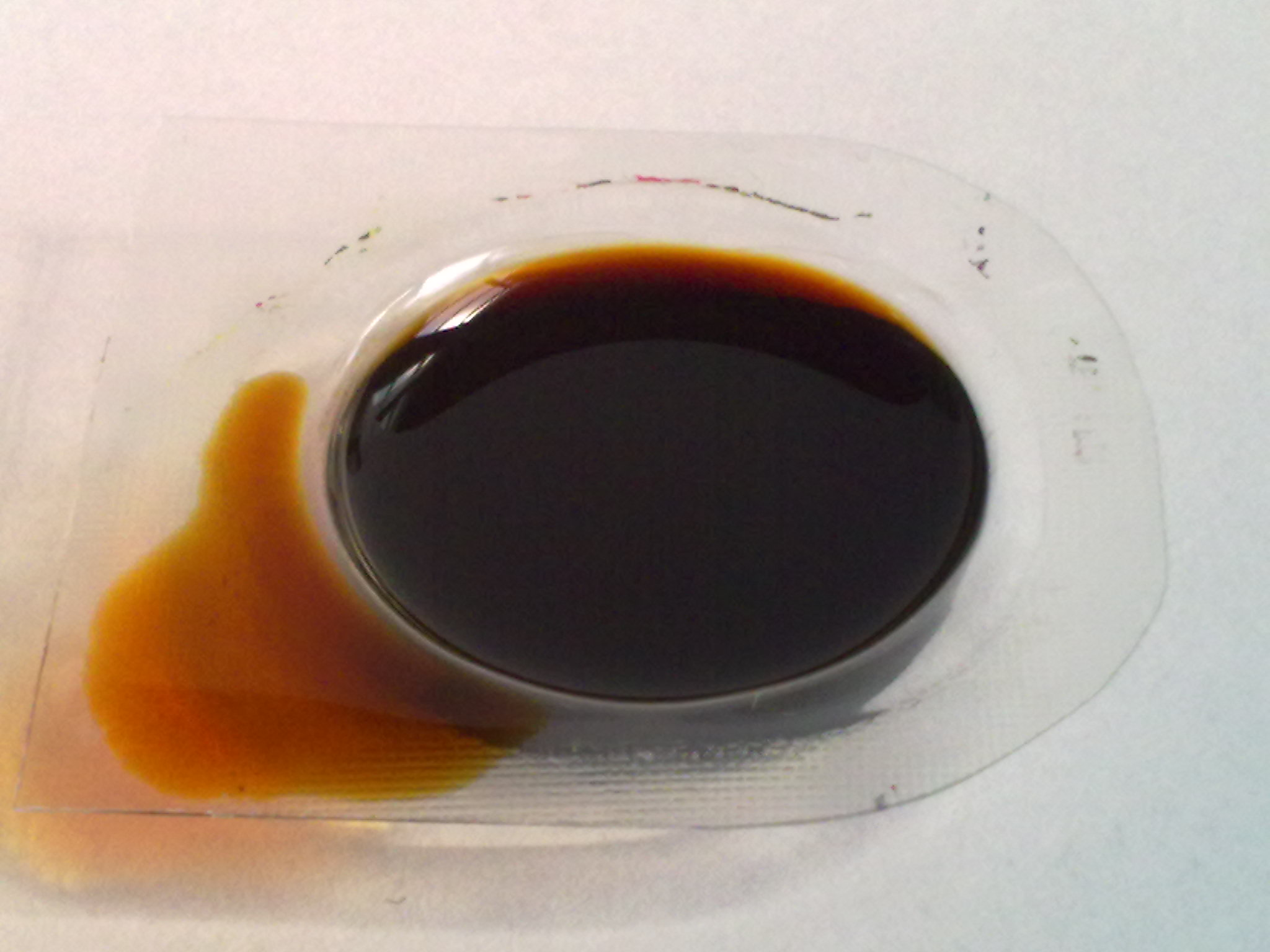 Tekočina C11-15-iso-Alkan